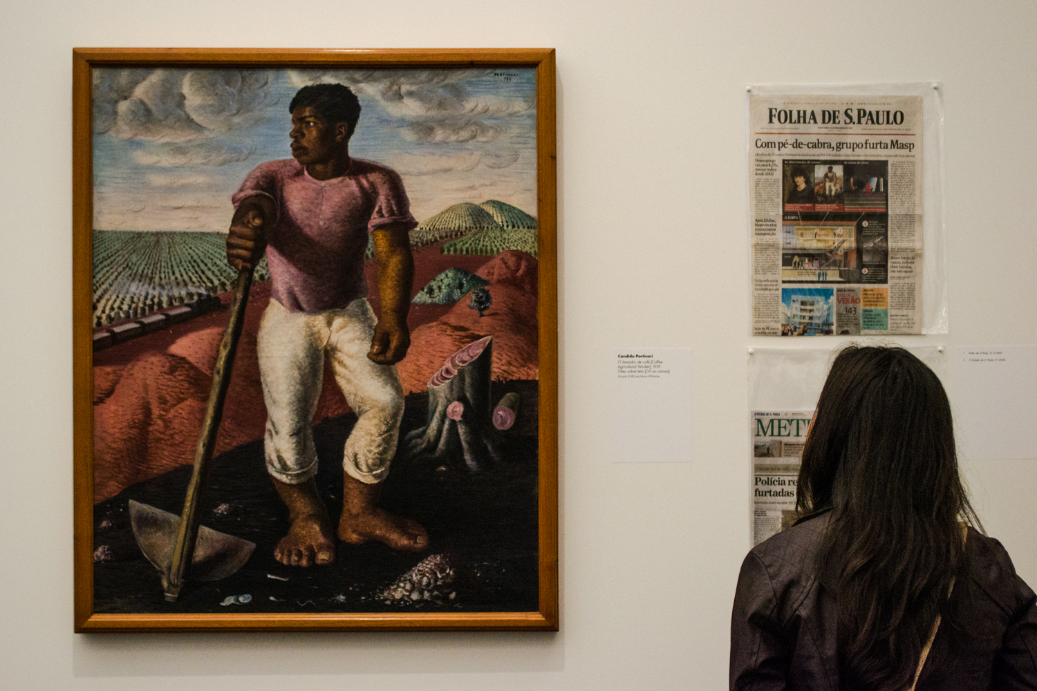 MASP, São Paulo, SP, Brasil.